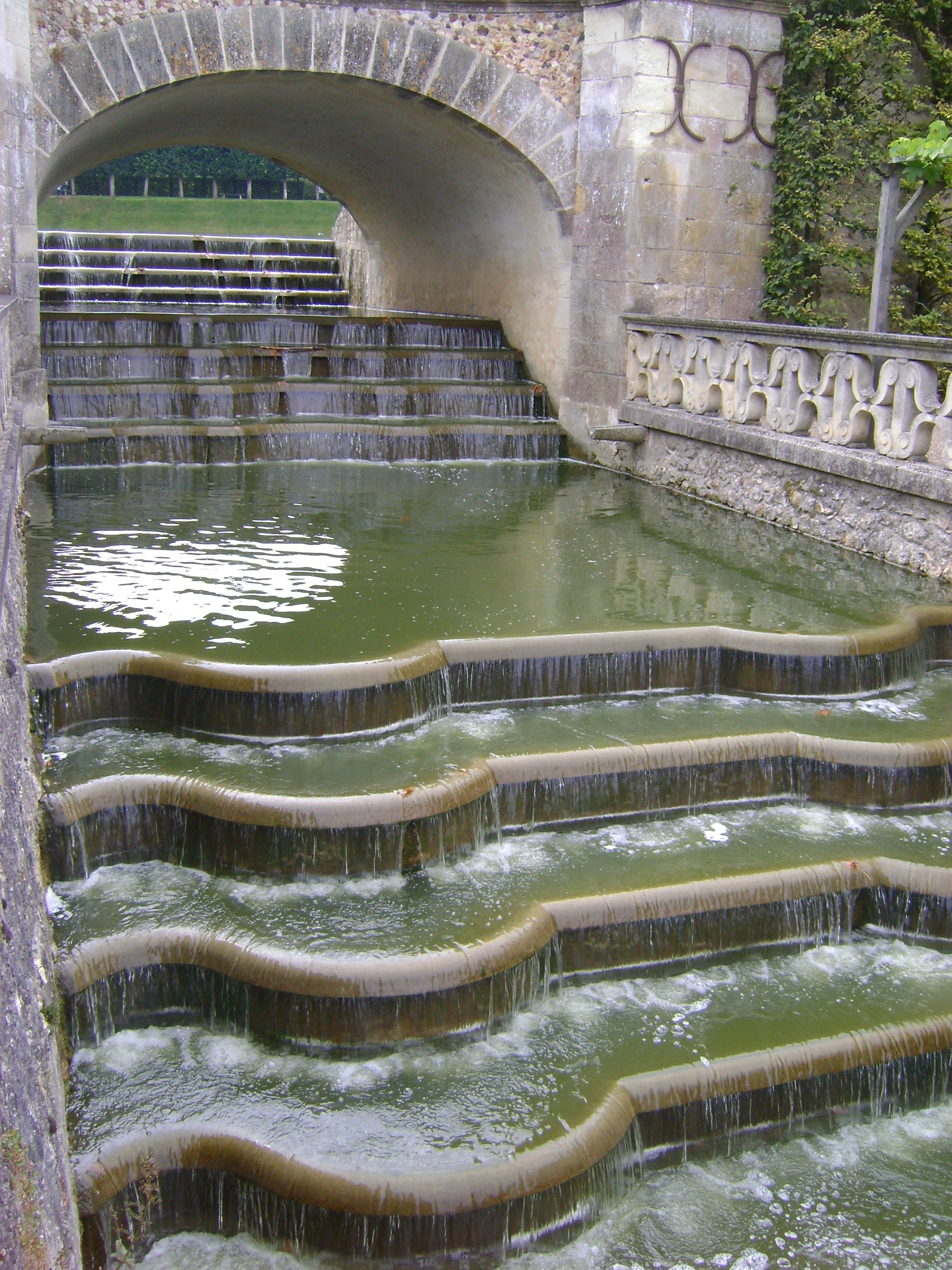 Château de Villandry, Indre-et-Loire. Le canal. This building is en partie classé, en partie inscrit au titre des Monuments Historiques.